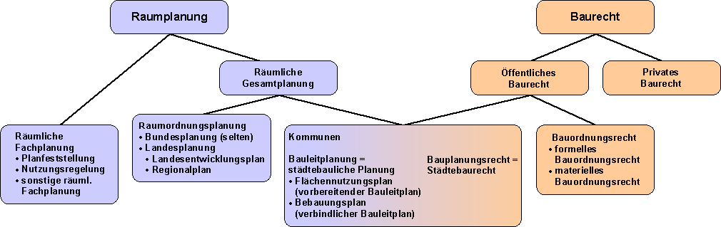 Übersicht Raumplanung & Baurecht Autor: C.Löser Erstellt mit: de: Draw